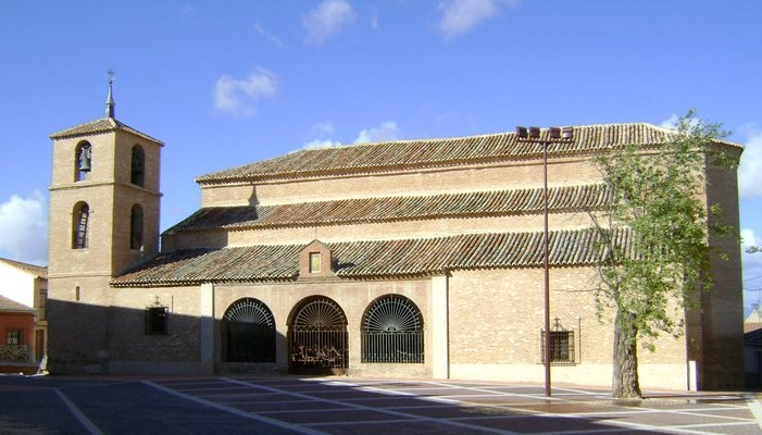 Iglesia de San Julián de Santa Olala